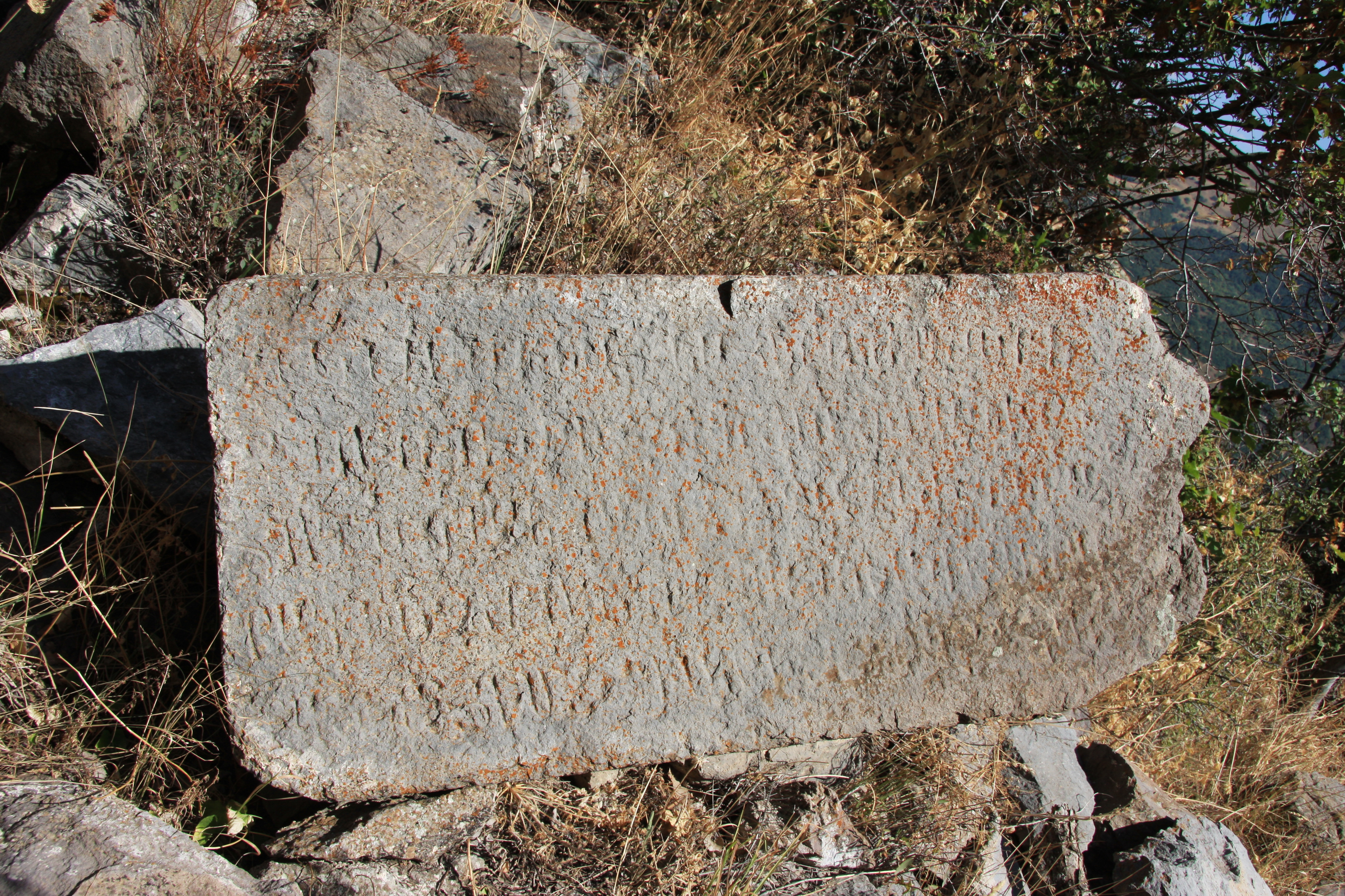 Վանական համալիր Քարեվանք Photo by Arthur Papoyan 21/19